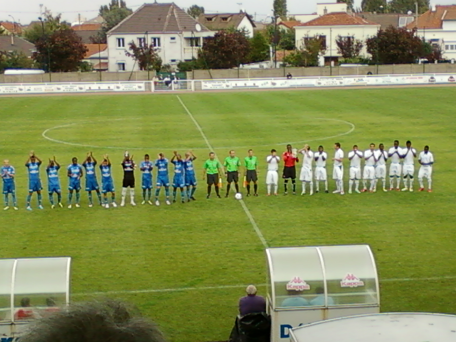 Présentation des équipes lors du match JA Drancy - Auxerre B du 04 septembre 2011 au stade Charles-Sage